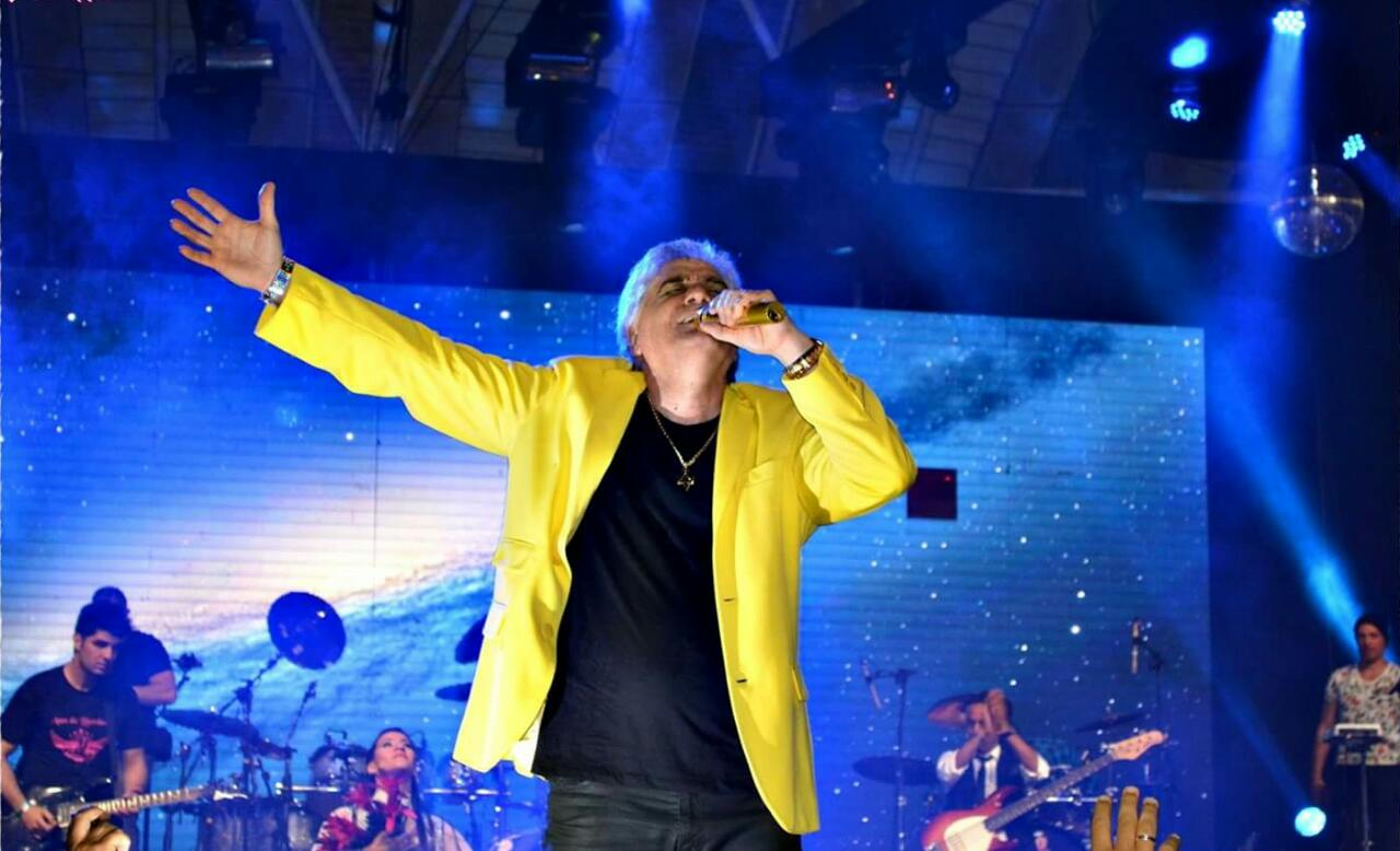 Pr. Carlos A. Moysés em 2013